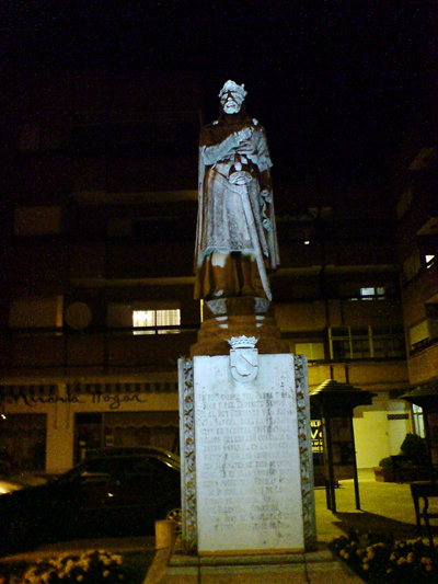 Estatua rememorando el Concilio de Coyanza.